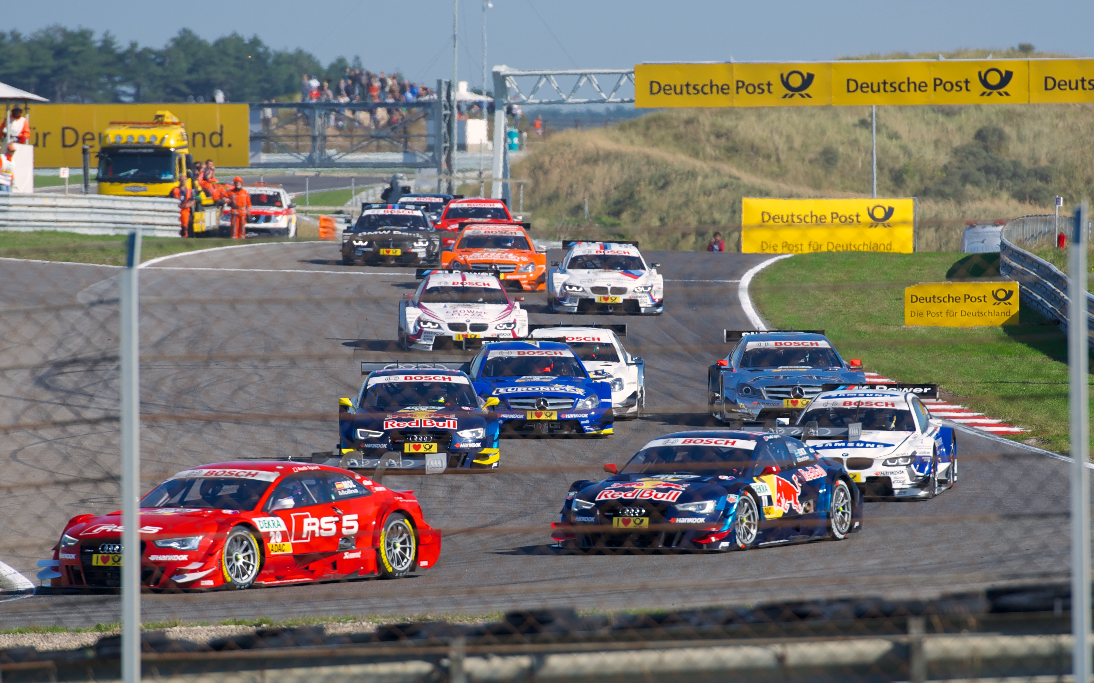 DTM Zandvoort, 2013.